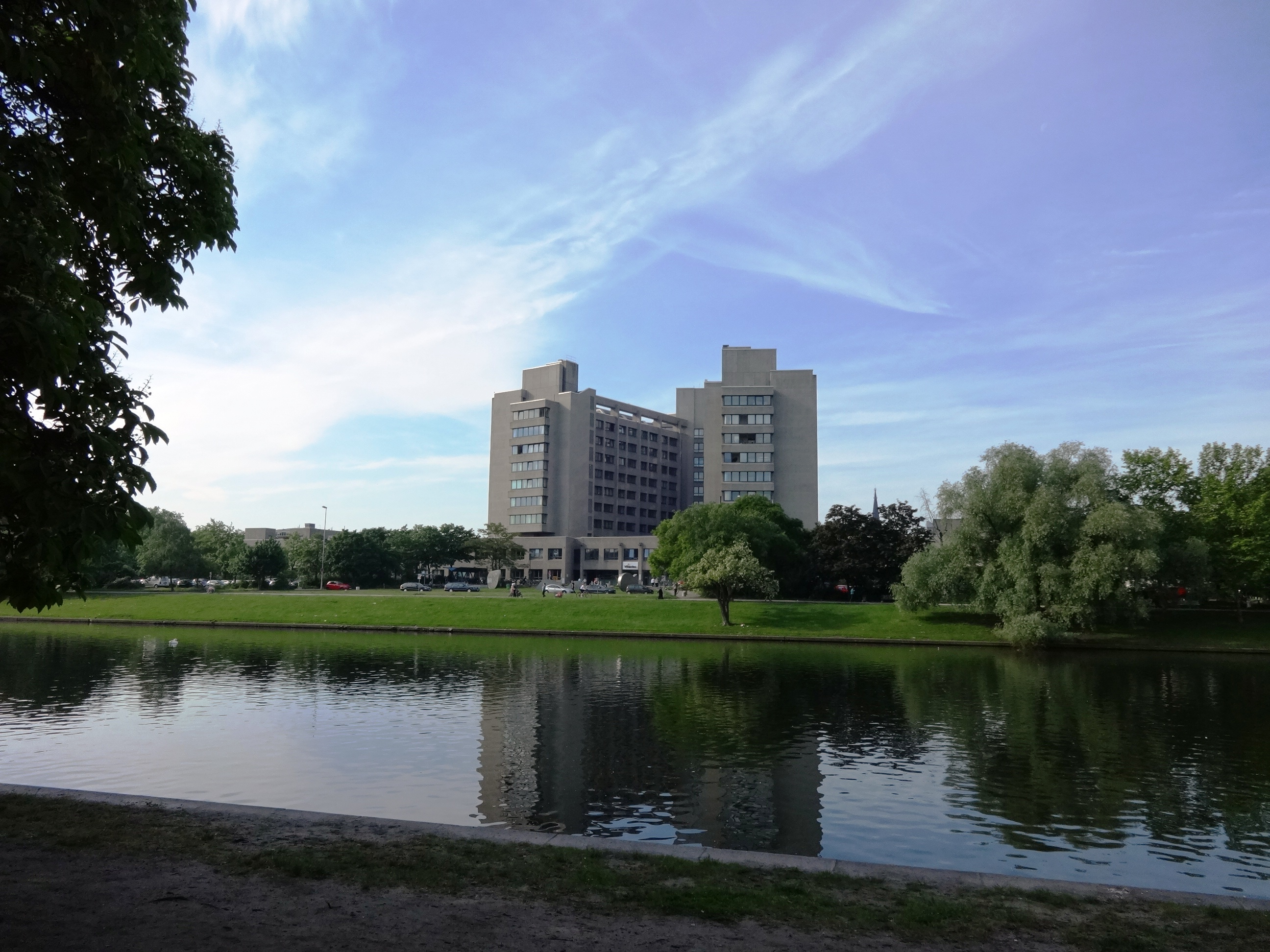 Blick vom Böcklerpark über den Landwehrkanal auf das Krankenhaus am Urban über den Urbanhafen